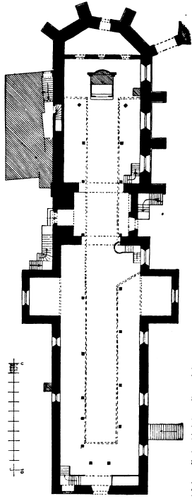 Grundriss der Stadtkirche Mutzschen (aus Beschreibende Darstellung der älteren Bau- und Kunstdenkmäler des Königreichs Sachsen. 19. Heft Amtshauptmannschaft Grimma, Fig. 224, von 1897)